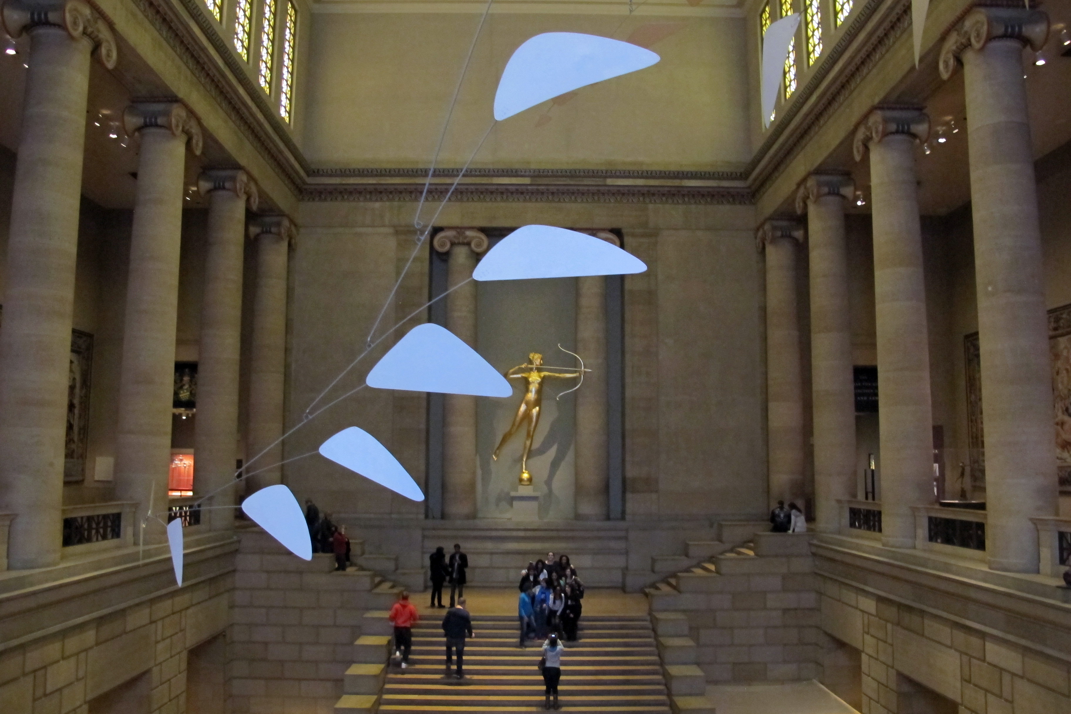 Philadelphia Museum of Art